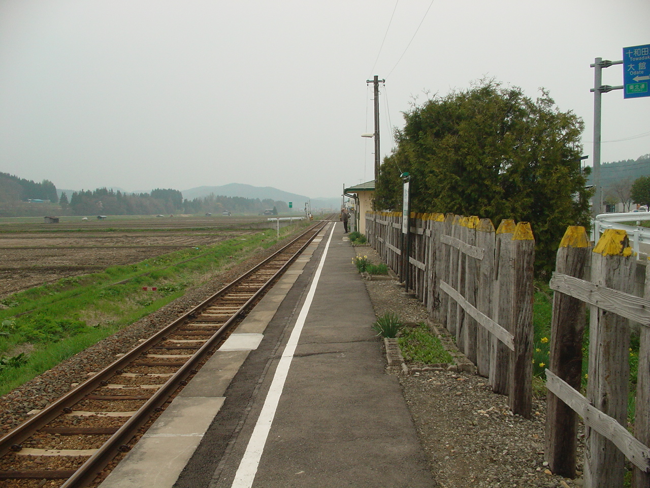 （陸中大里駅）